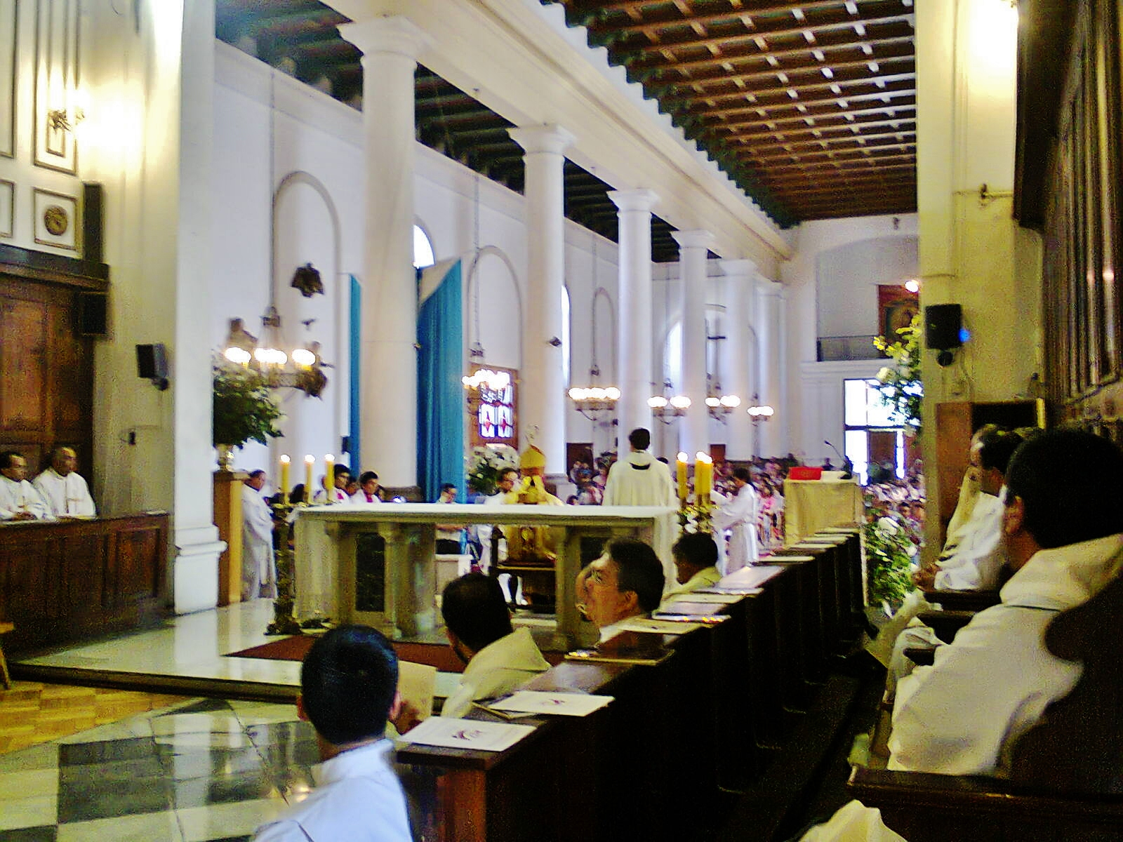 Vista de la Catedral de San Felipe, Chile, durante una solemne Misa de ordenación sacerdotal, encabezada por el Sr. Obispo con la totalidad de su clero.